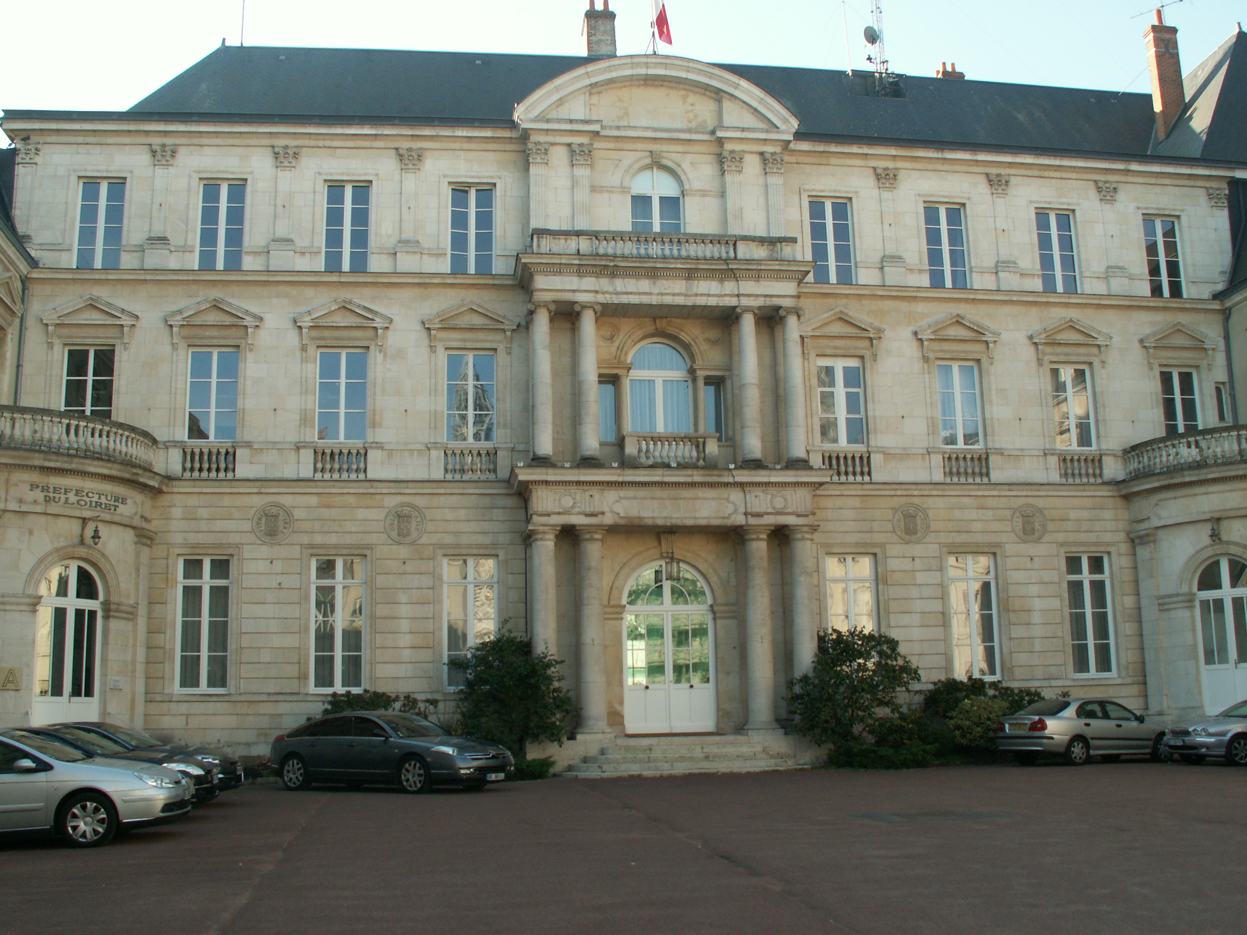 This building is en partie classé, en partie inscrit au titre des Monuments Historiques. .